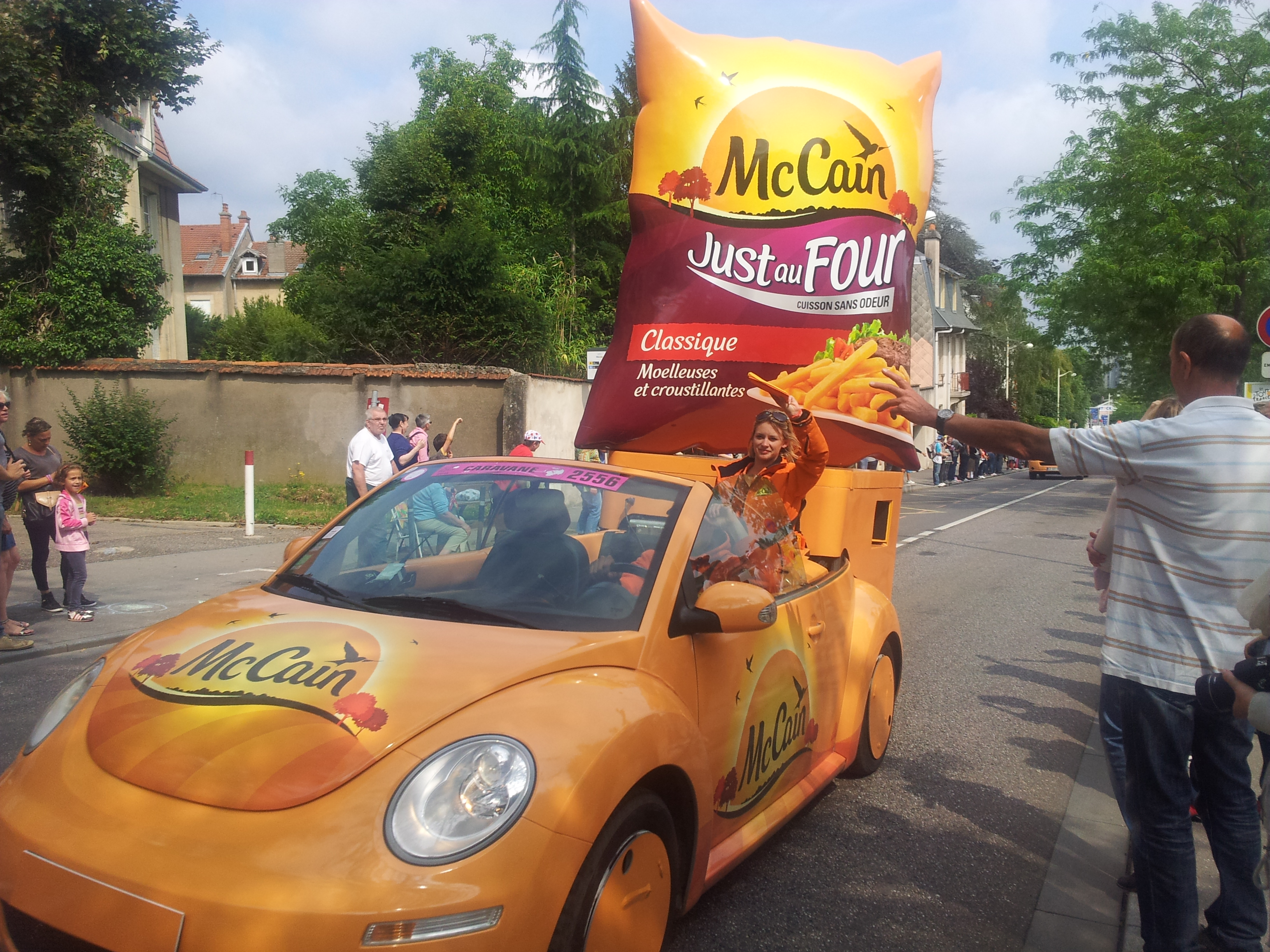 Véhicule de la caravane du Tour de France 2014 dans la côte de Boufflers à Nancy (7e étape).